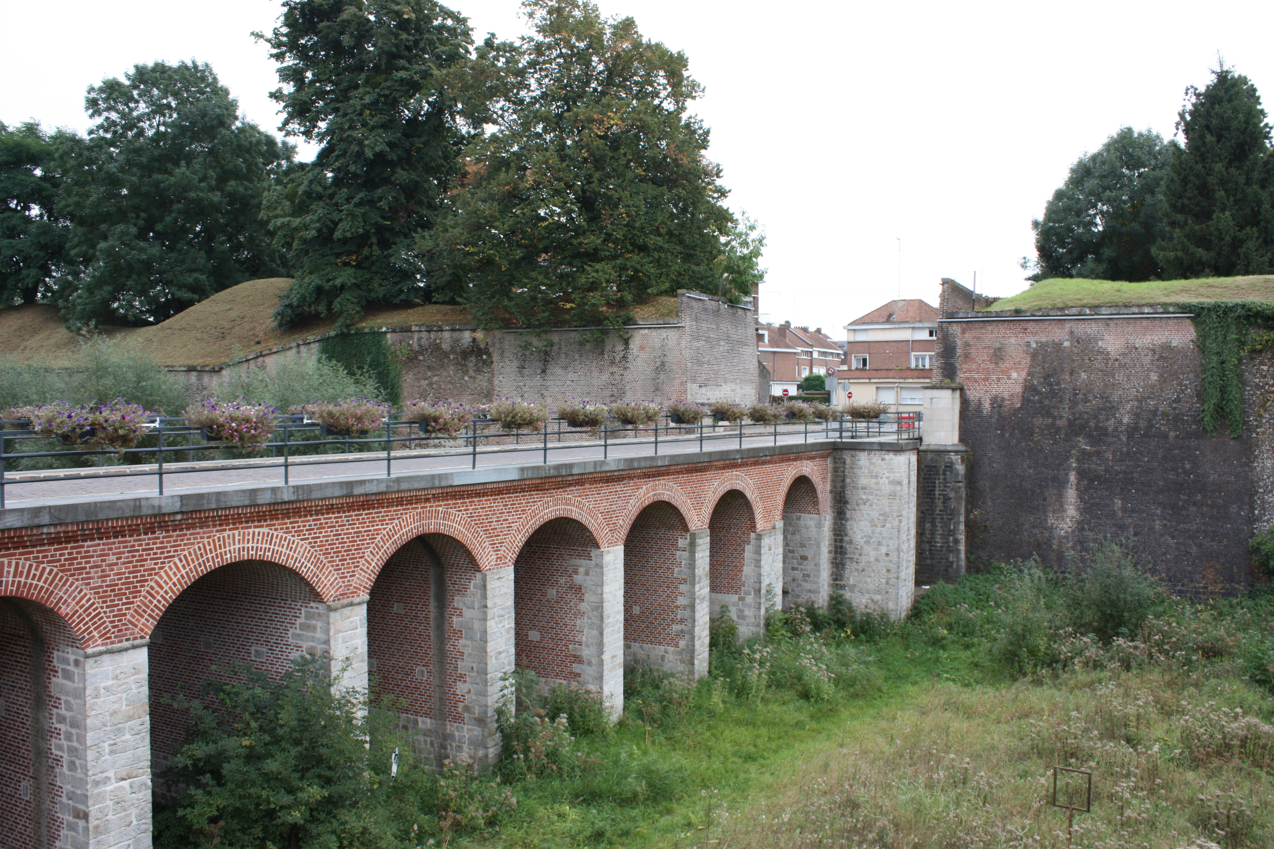 Citadelle du Quesnoy